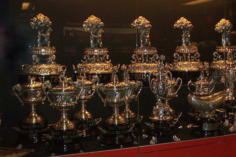 Vitrina con los trofeos "Villa de Madrid" ganados por el Club Atlético de Madrid.